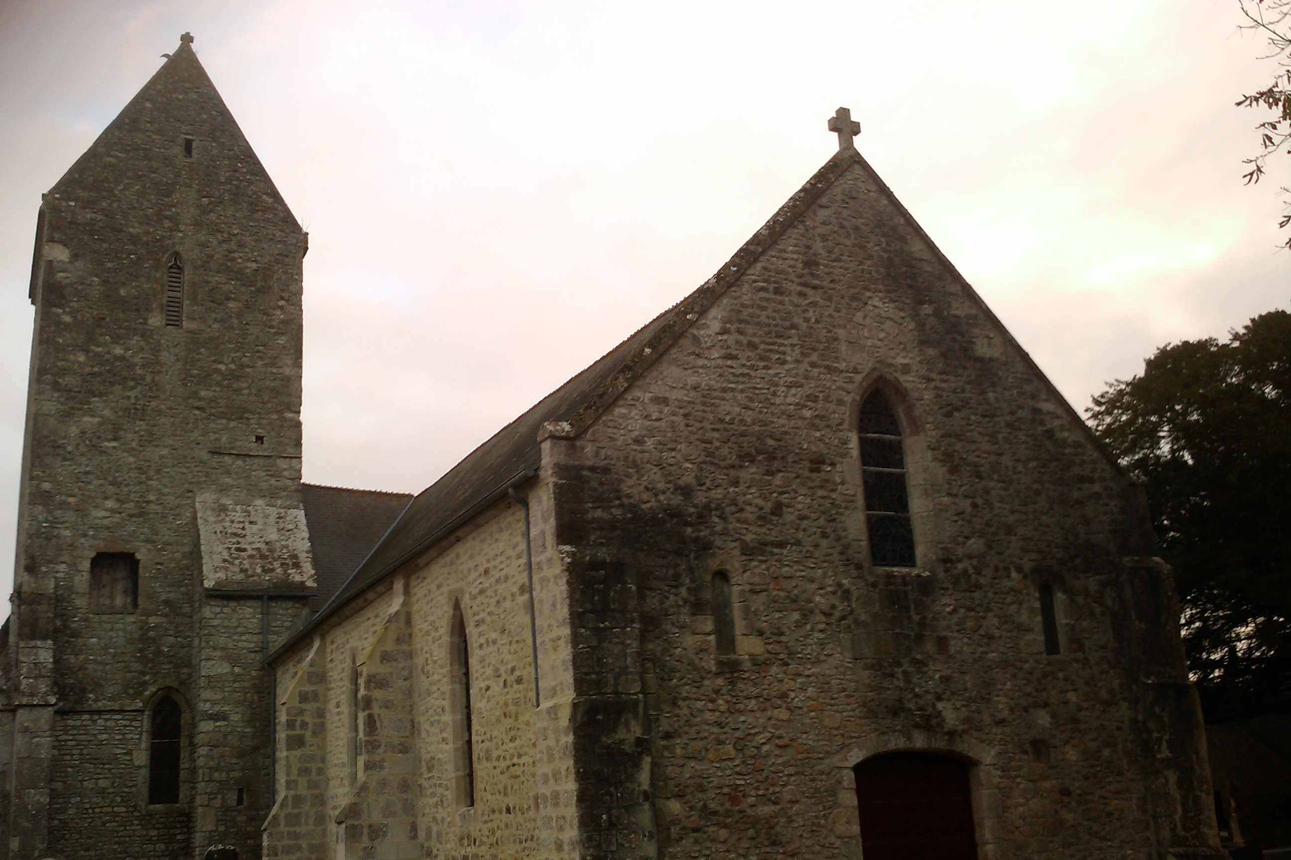 Église Saint-Ermeland de Gourbesville